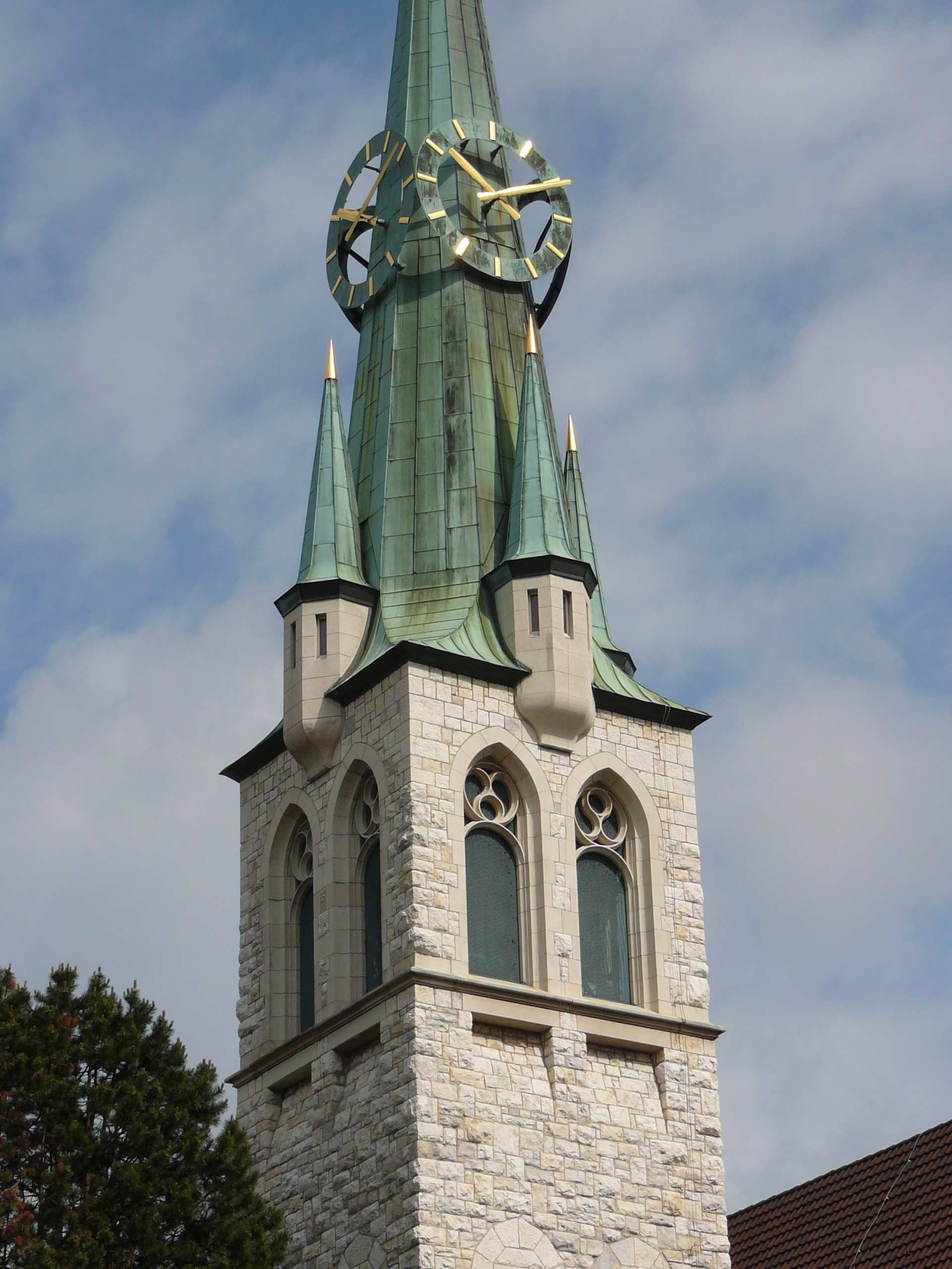 Römisch-katholische Kirche Herz Jesu Oerlikon, Kirchturm